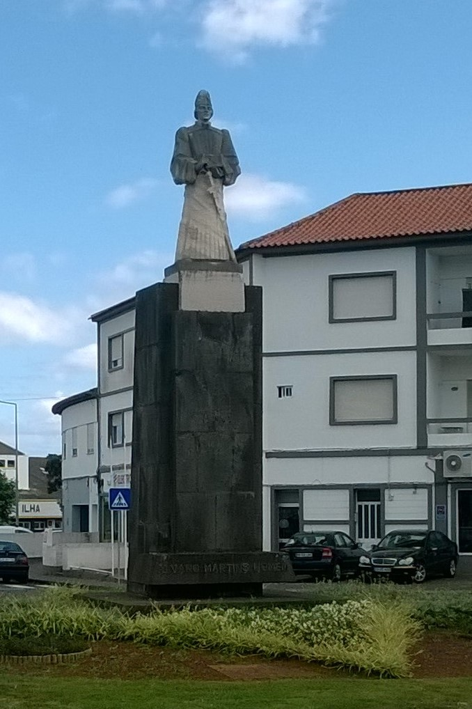 Monumento a Álvaro Martins Homem, Angra do Heroísmo, ilha Terceira, Região Autónoma dos Açores. De autoria do escultor João Fragoso, foi inaugurada a 17 de julho de 1960 na Praça Velha e, em 1984, removido e instalado na rotunda das Avenidas Novas.